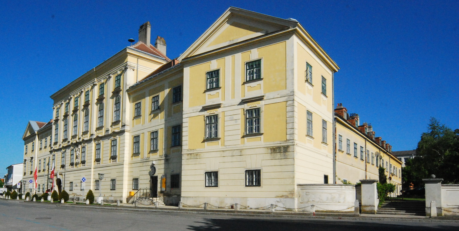 Schloss, heute Rathaus von Mannersdorf am Leithagebirge in Niederösterreich